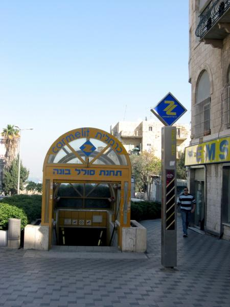 הכניסה לתחנת הכרמילת ברחוב הנביאים בחיפה